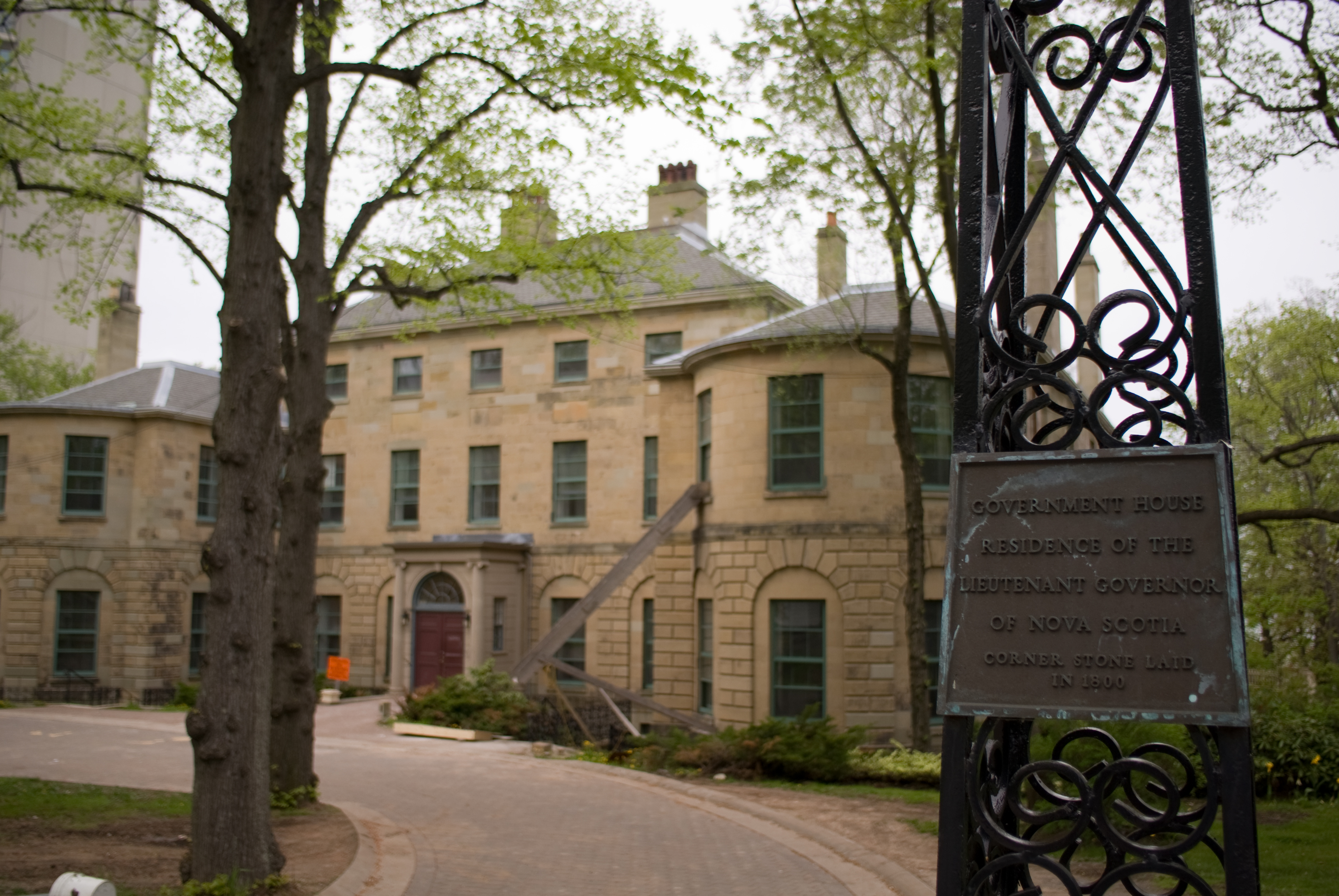 L'hôtel des Gouverneurs à Halifax, résidence officielle du lieutenant-gouverneur de la Nouvelle-Écosse. Il a été désigné lieu historique national en 1982